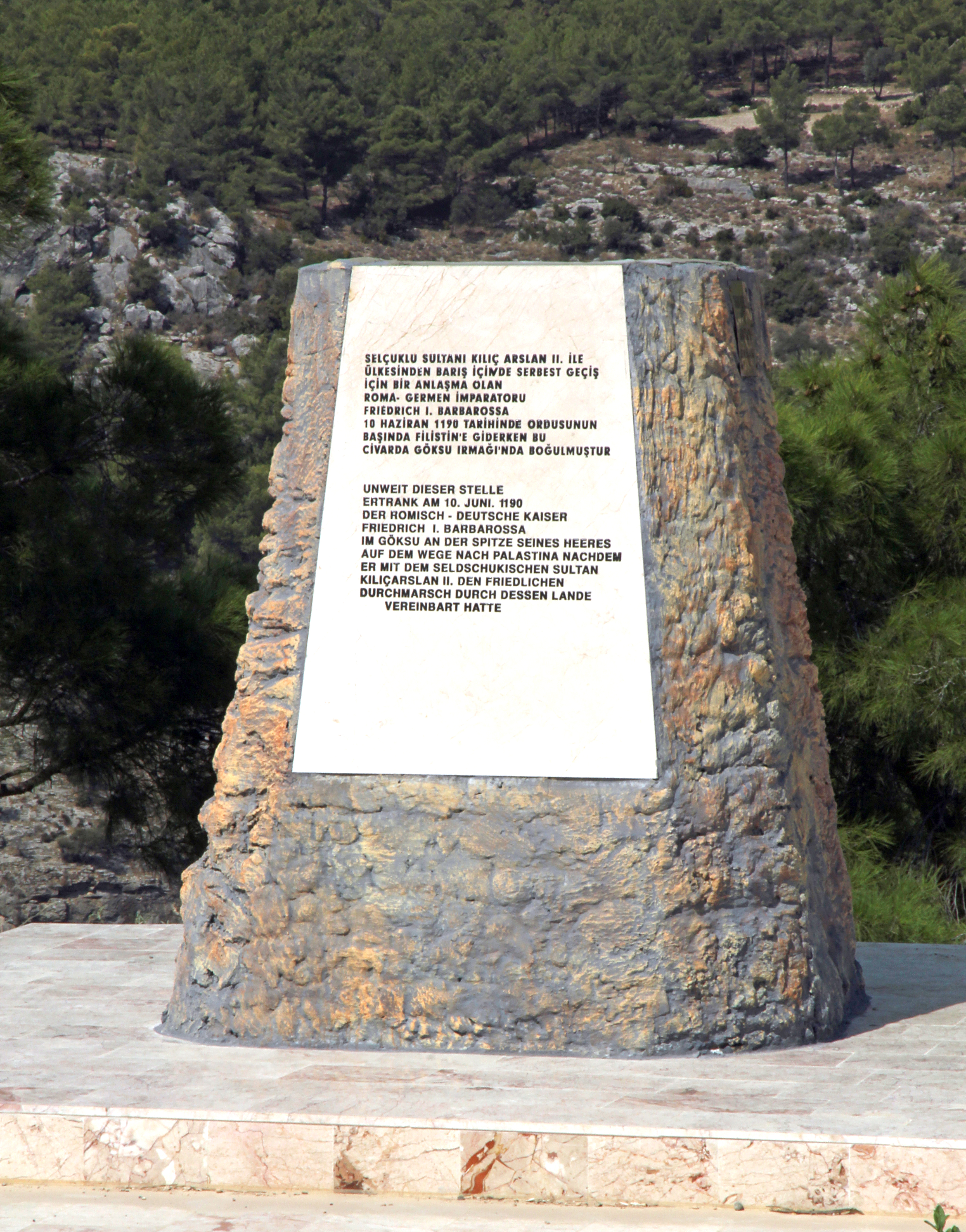 Gedenkstein für Kaiser Friedrich Barbarossa am Fluss Saleph (heute Göksu) nahe Silifke, Südtürkei